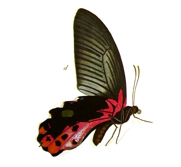 Papilio alcmenor